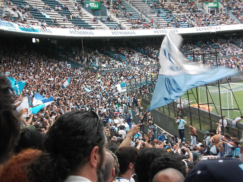 Hinchada de Racing Club en un clásico frente a River en 2006